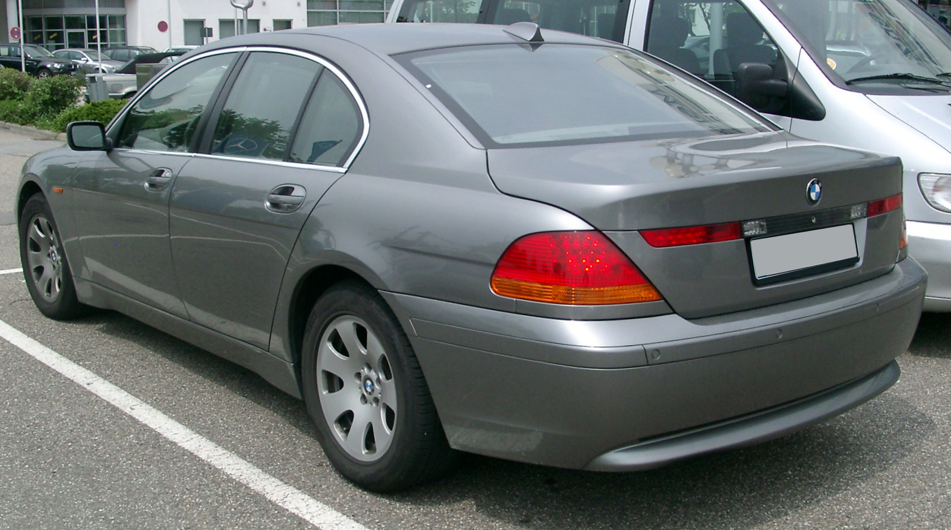 BMW E65